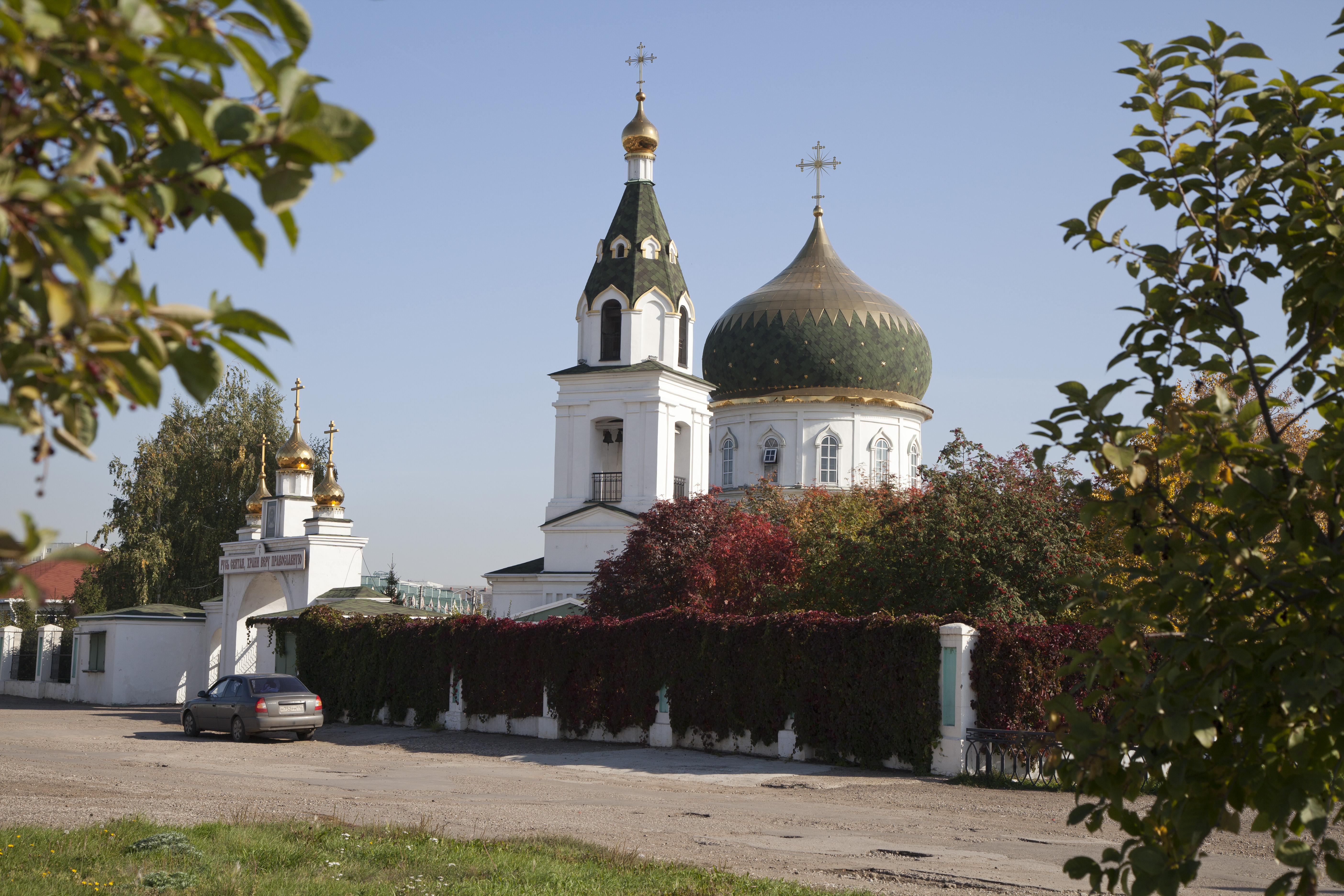 Вид с Набережночелнинского проспекта